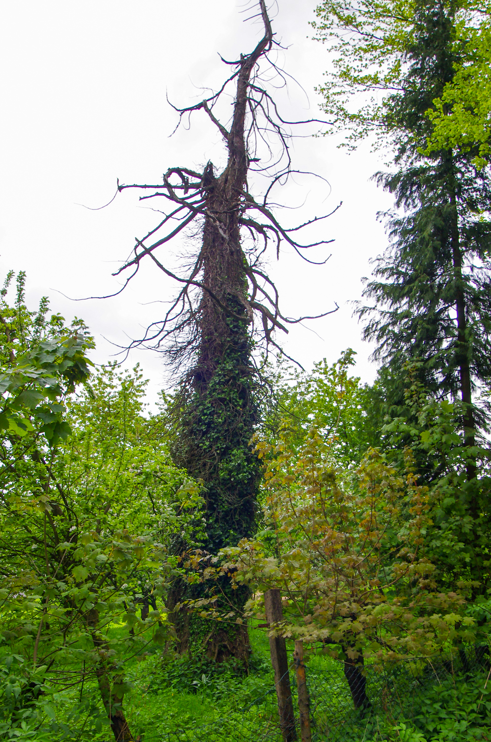 bývalý památný strom - Sekvoj v Kostelní Bříze, okres Sokolov